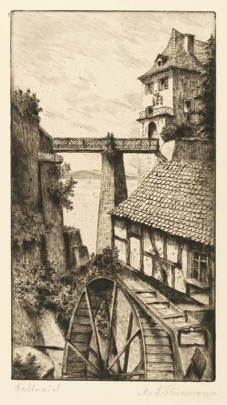 Radierung / Kaltnadel, in Schwarz, auf Kupferdruckpapier, um 1930. Von Margarete Thiemann. 27,0 x 14,9 cm (Darstellung / Platte) / 42 x 29,5 cm .